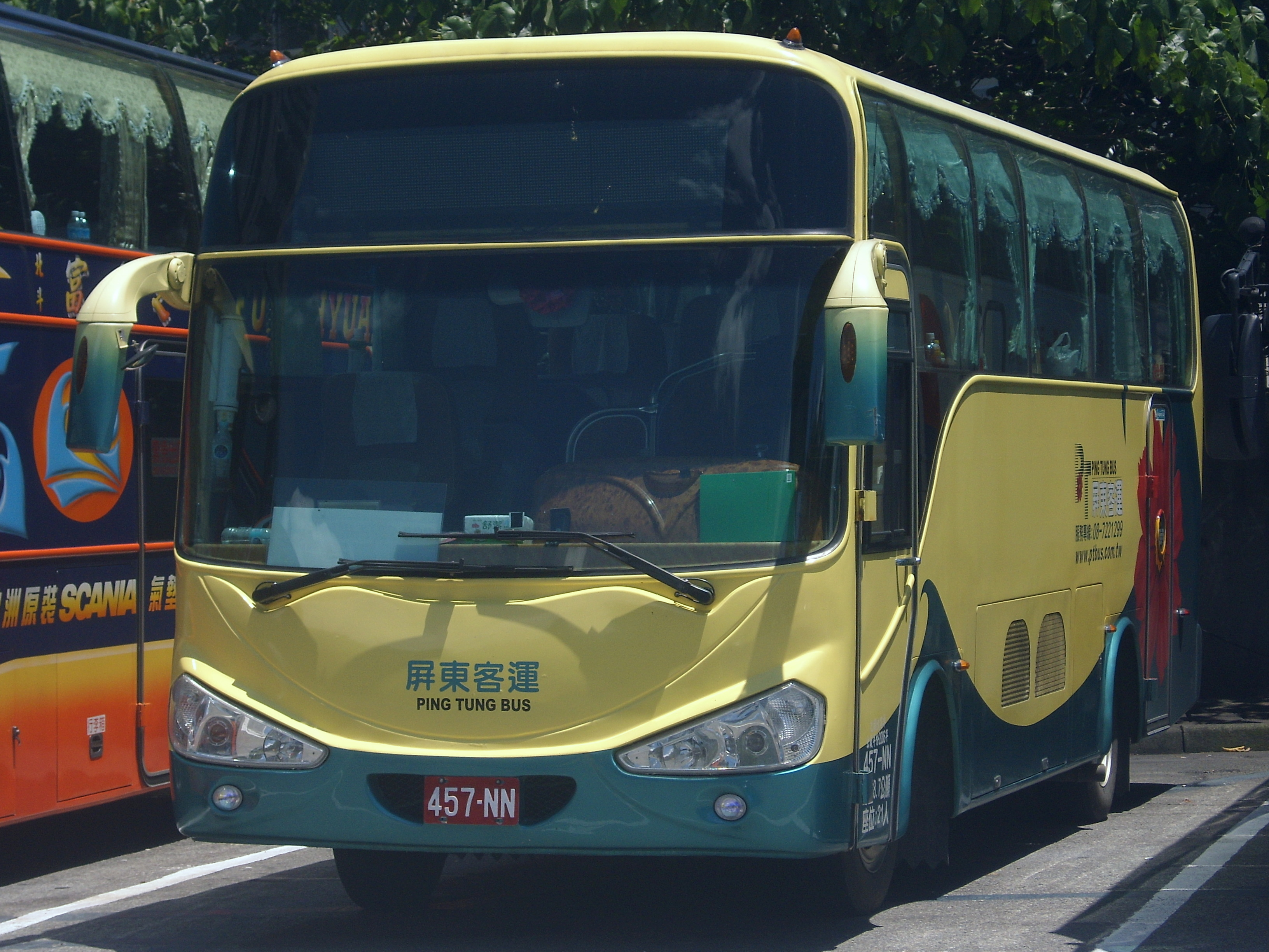 Pingtung Bus - ISUZU NQR70PBL.